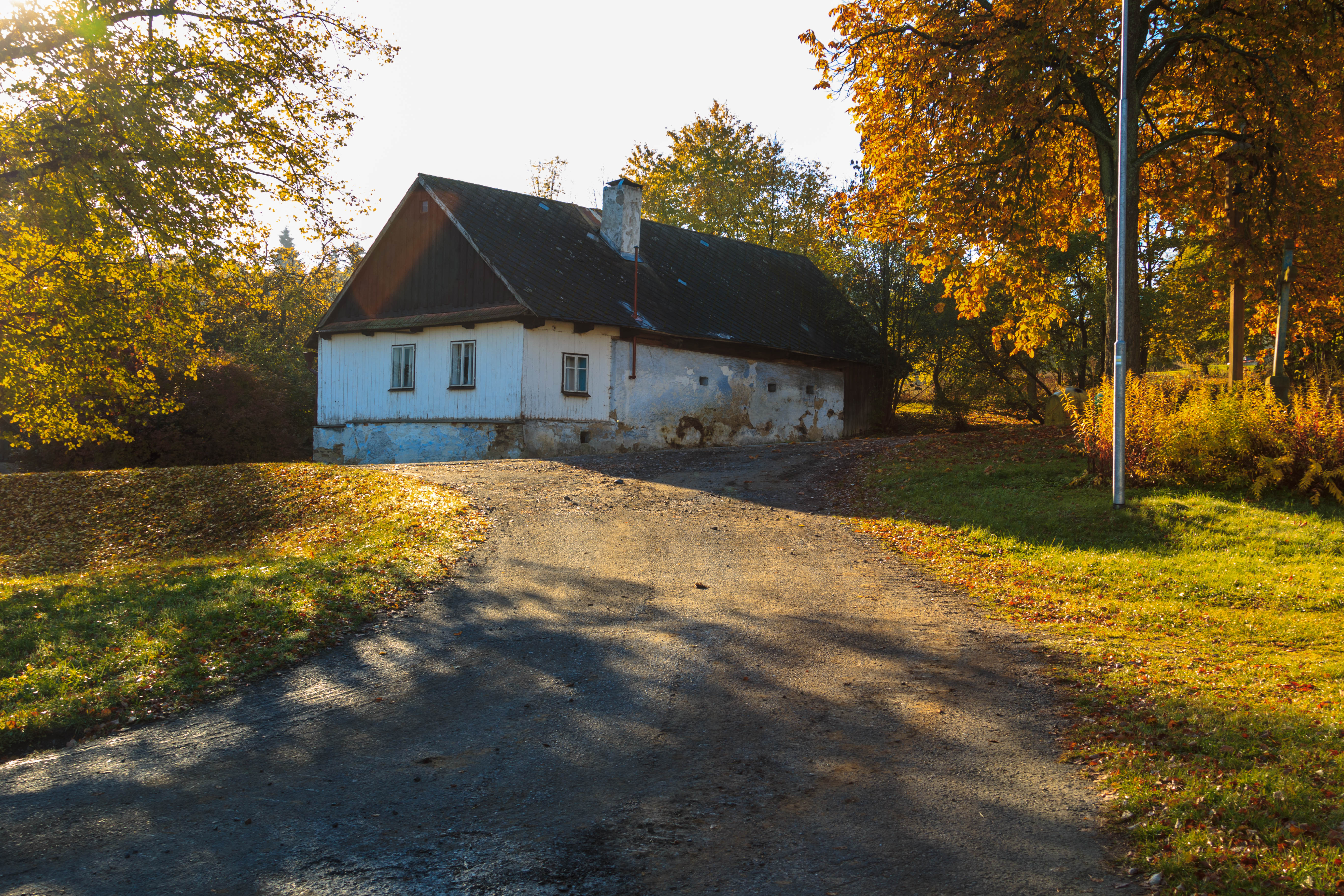 Hluboká 9